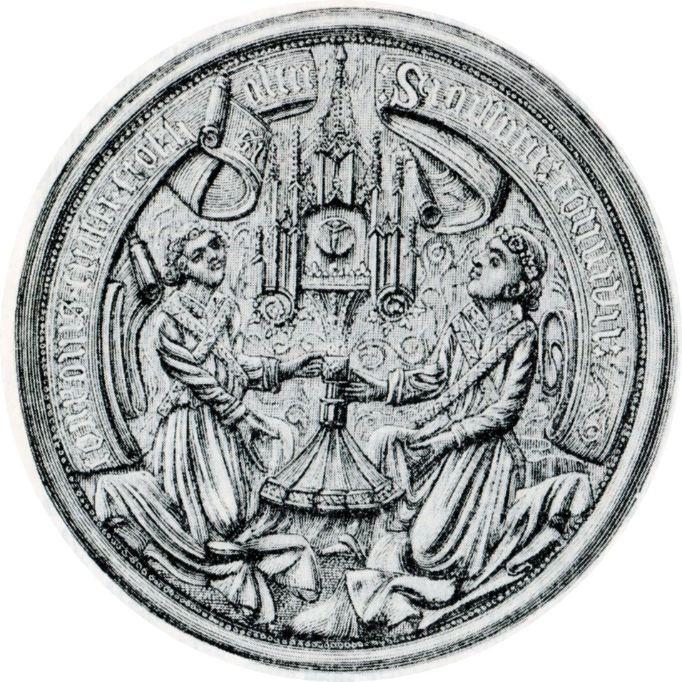 Helga lekamens sigill och vapen